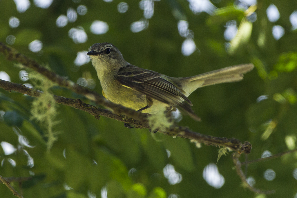 Planalto Tyrannulet - Intervales NP - Brazil_S4E9432